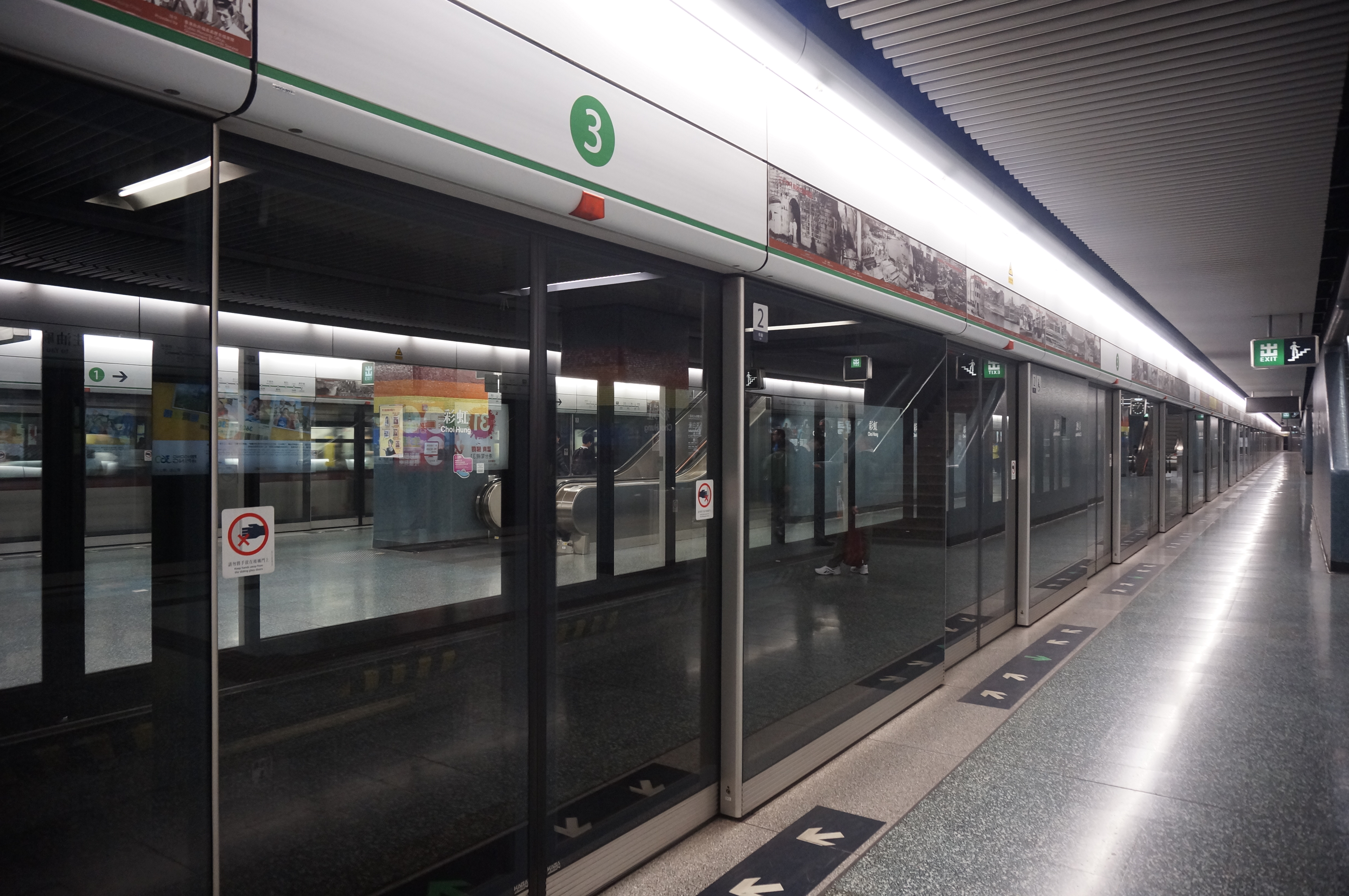 港鐵彩虹站月台